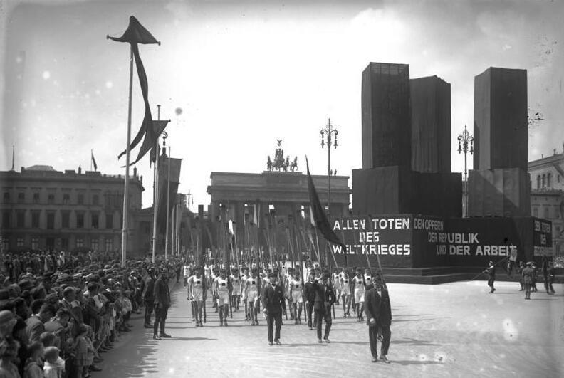 Die grosse Verfassungsfeier am 11. August in Berlin! Ruderabordnungen des Reichsbanners beim Einzug durch das Brandenburger Tor in Berlin.